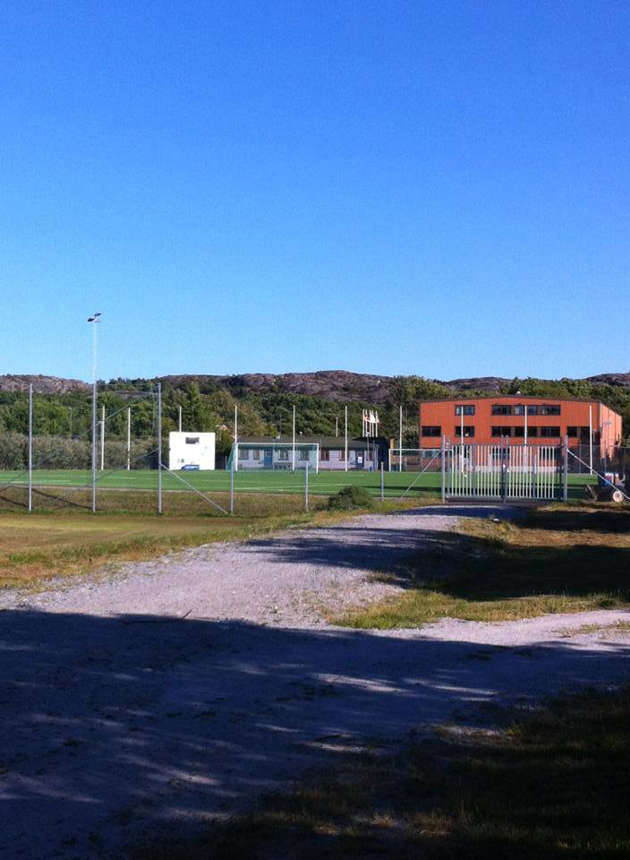 Tjörns Sparbank Arena en sommardag.